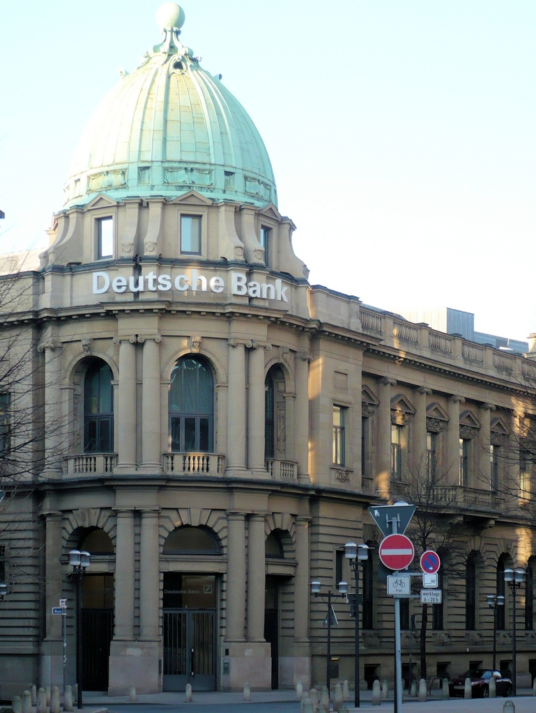 Bankenviertel Essen, Gebäude der ehem. Essener Creditanstalt, heute Deutsche Bank